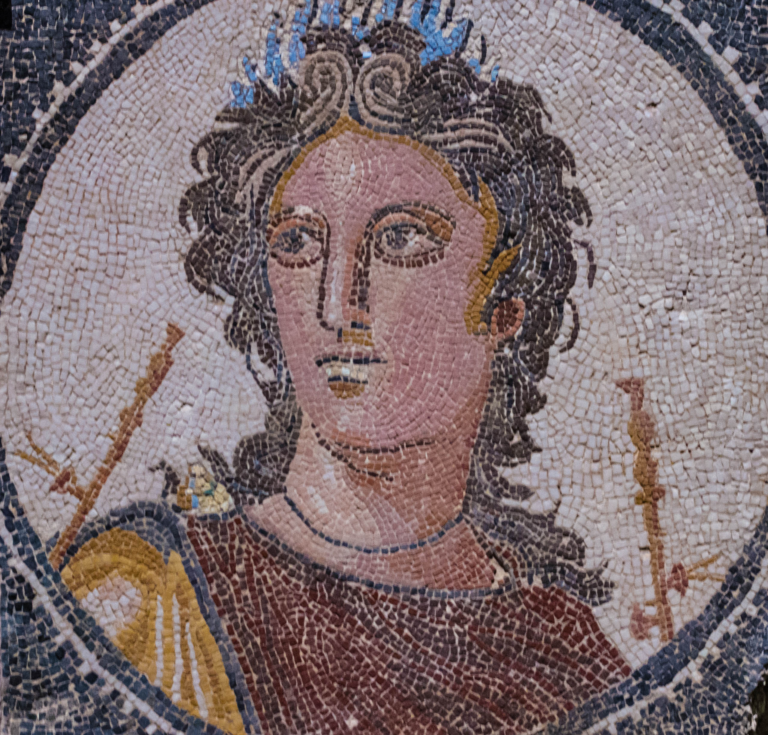 Muse Euterpe avec deux tibiae de parte et d'autre de son buste.